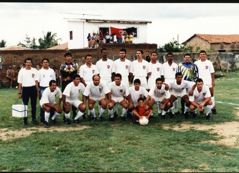 Equipe campeã tabirense de 1994.